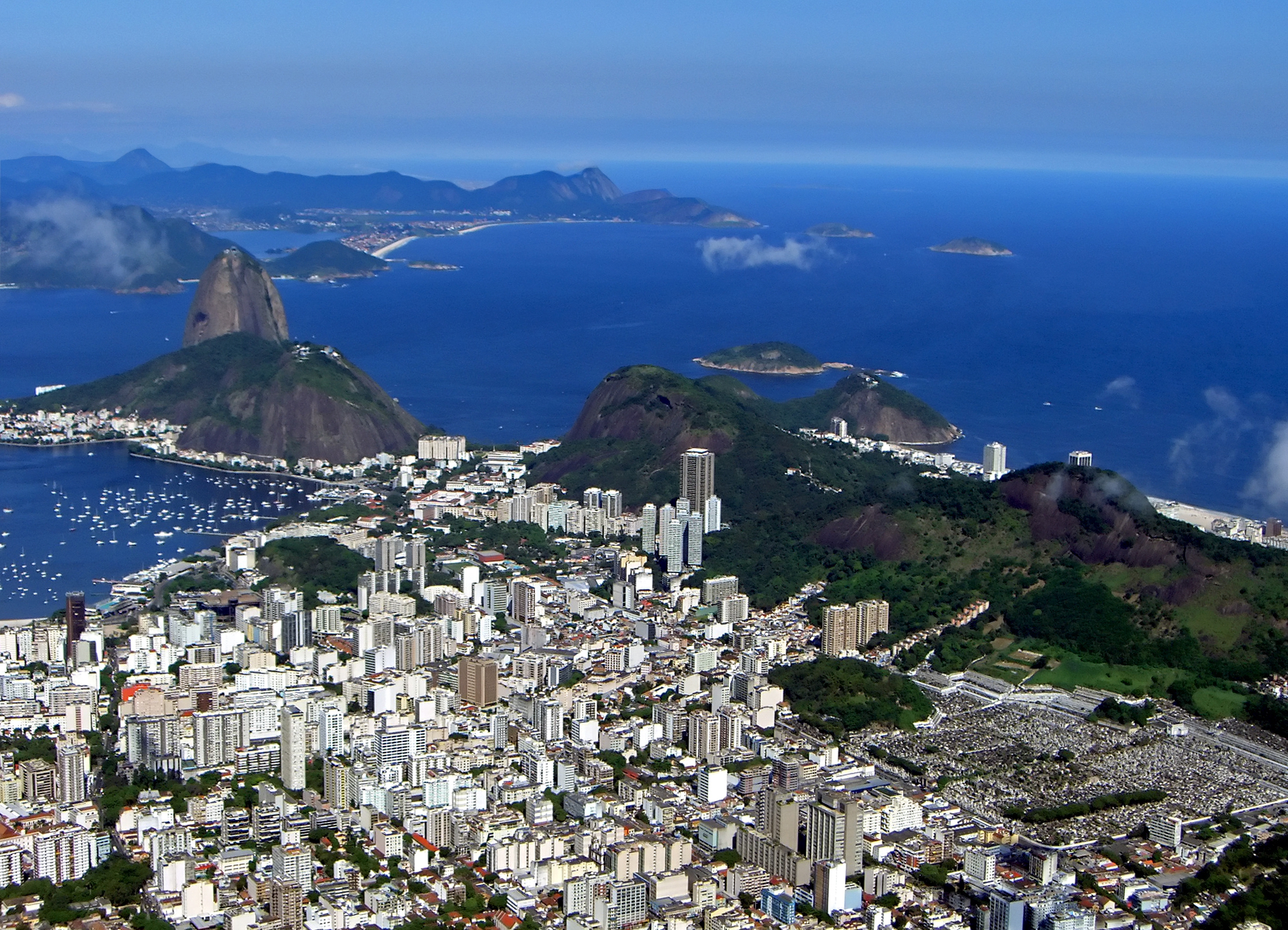 View of Rio de Janeiro from Corcovado Mountain